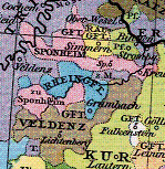 Gft.en Sponheim, Veldenz und die Rheingft. um 1400